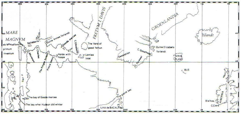 Carte géographique du quatrième voyage de Henry Hudson, 1610-1611.